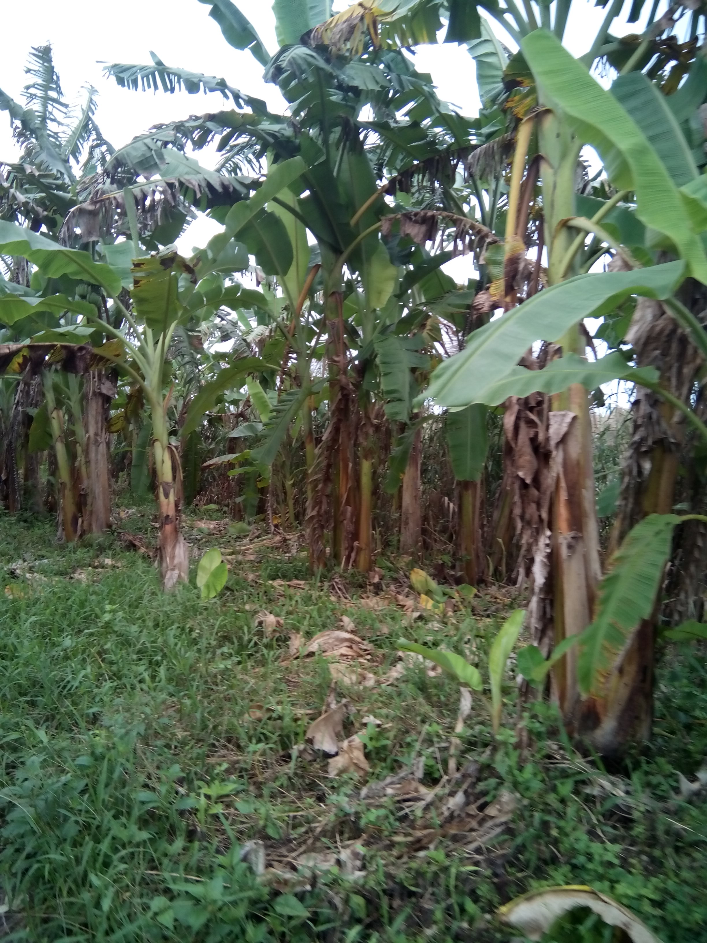 Những cây chuối trong rừng Quốc gia U Minh hạ, Việt Nam